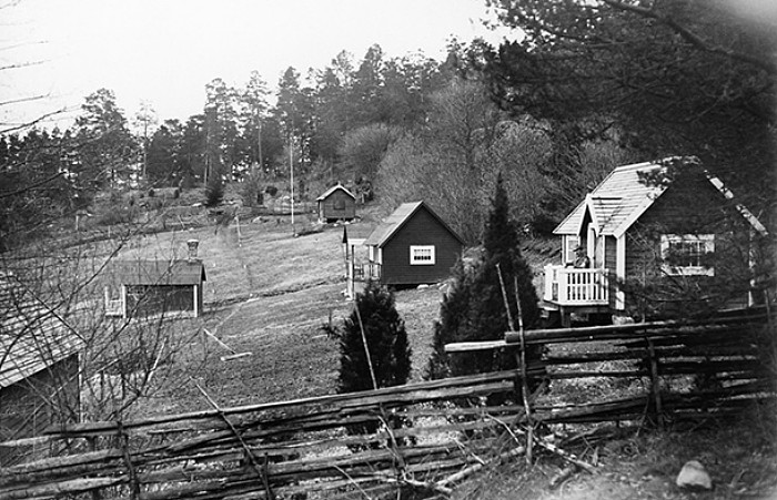 Grönstakolonin i småorten Grönsta på Sticklinge, Lidingö